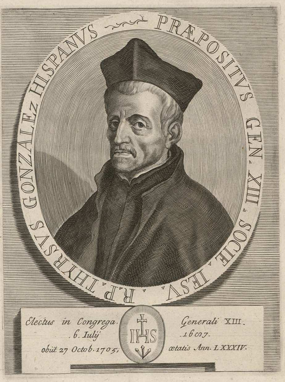 Tirso González. Grabado de Arnold von Westerhout para los "Ritratti de' prepositi generali della Compagnia di Gesù delineati, ed incisi da Arnaldo Van Westherhout", Roma, 1748. Biblioteca Nacional de España.